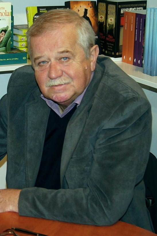 Marian Dziędziel, aktor. Targi Książki w Krakowie 2012.